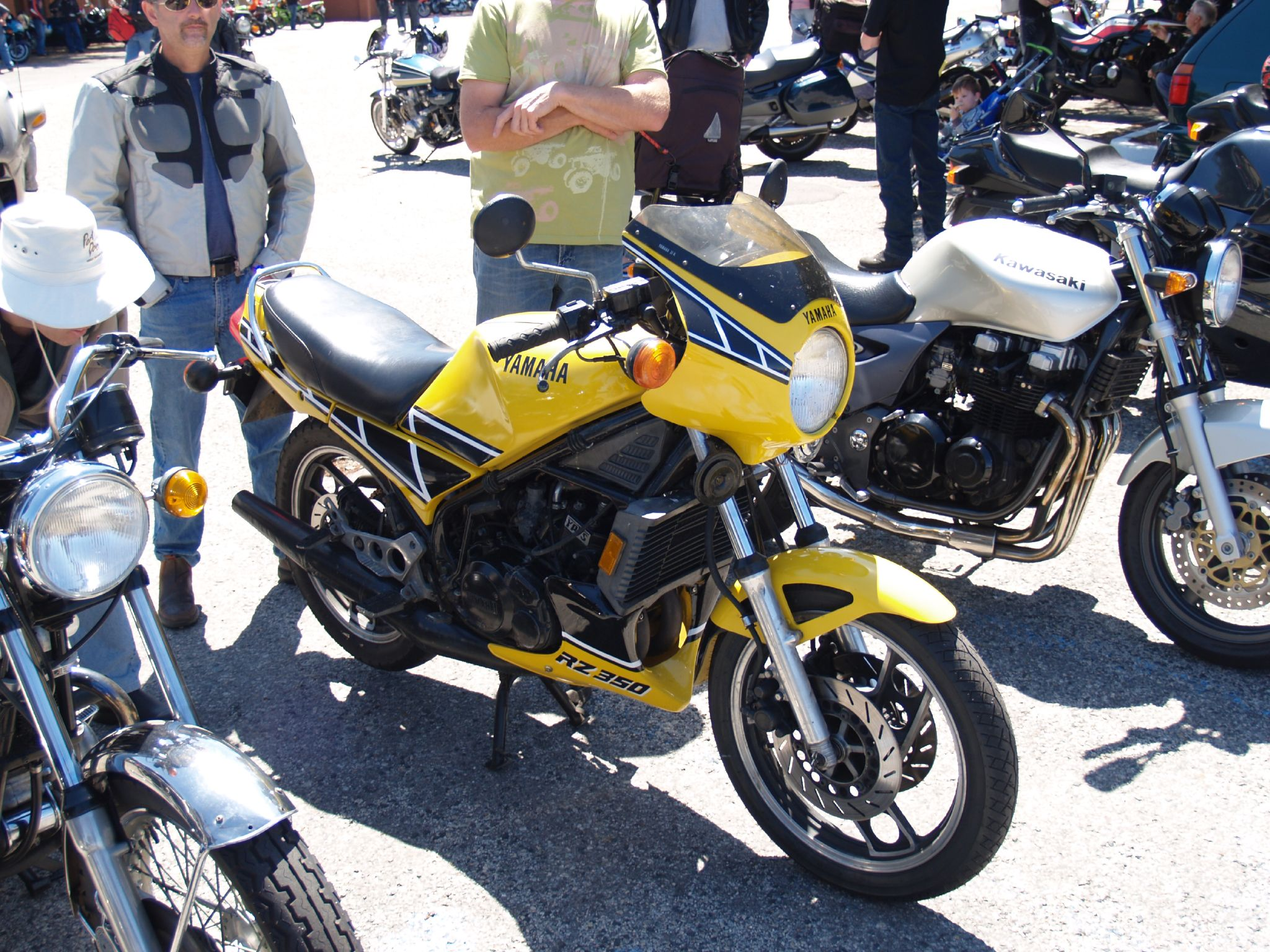 A true legend!